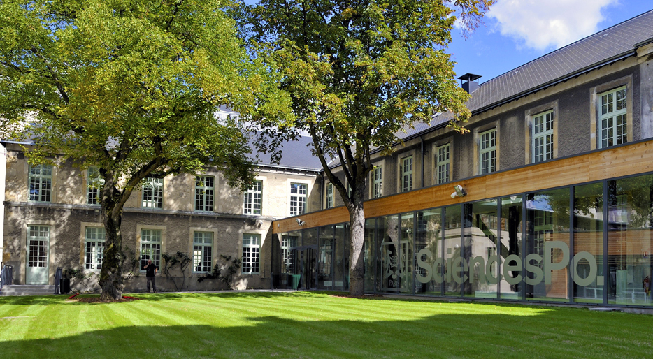 College di Reims